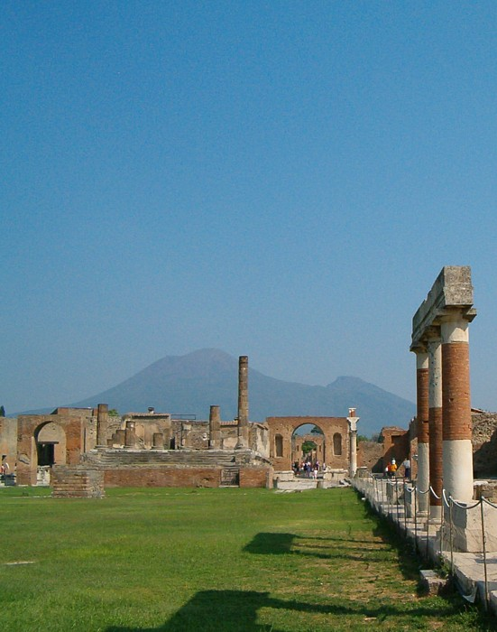 Pompei; Forum